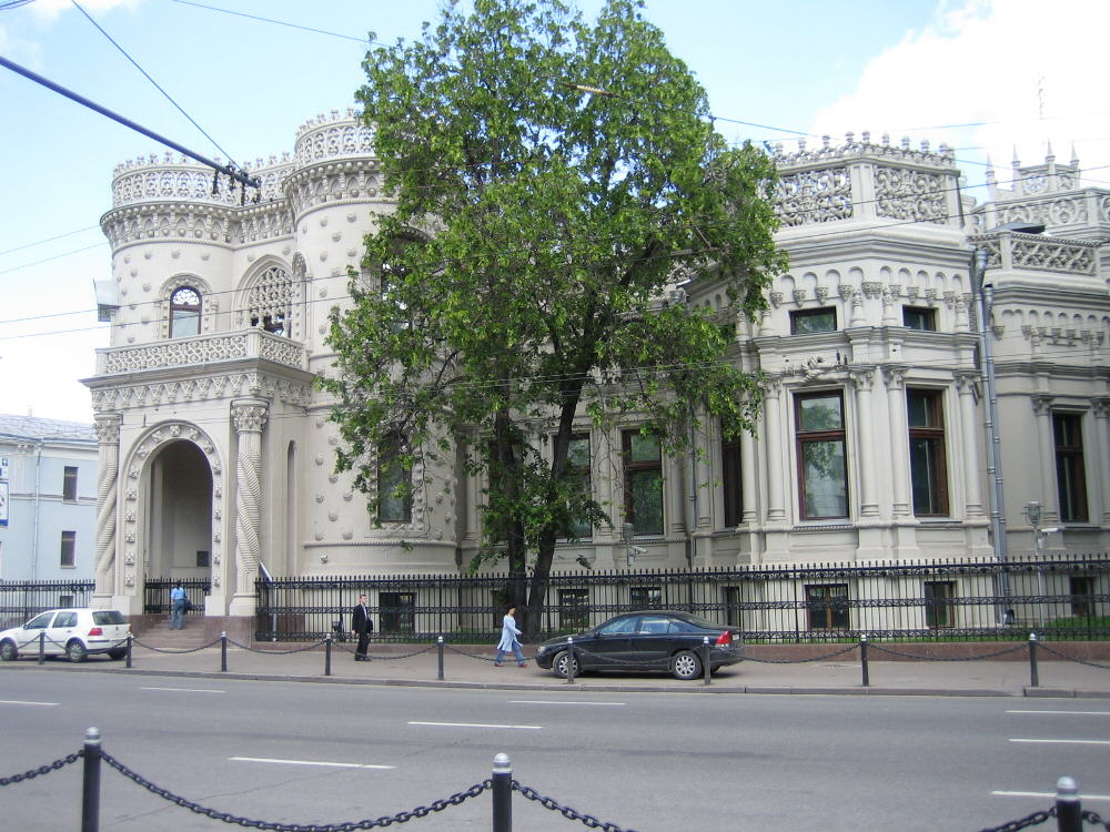 Дом А.А.Морозова на Воздвиженке (17.06.2006)